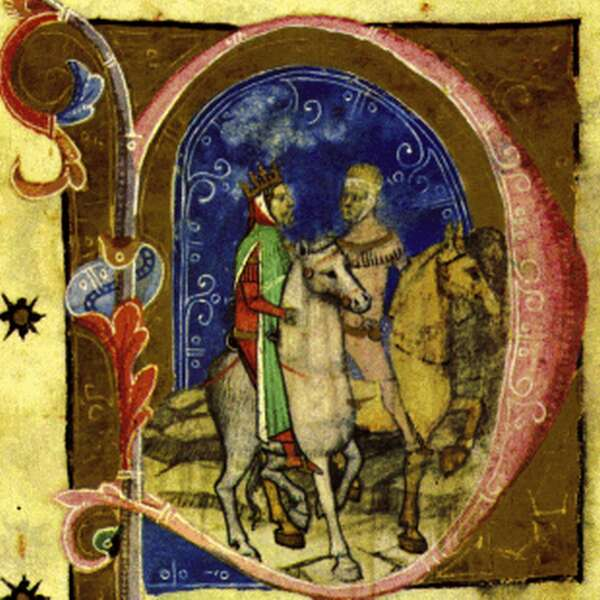 Václav III. cesta do Uher